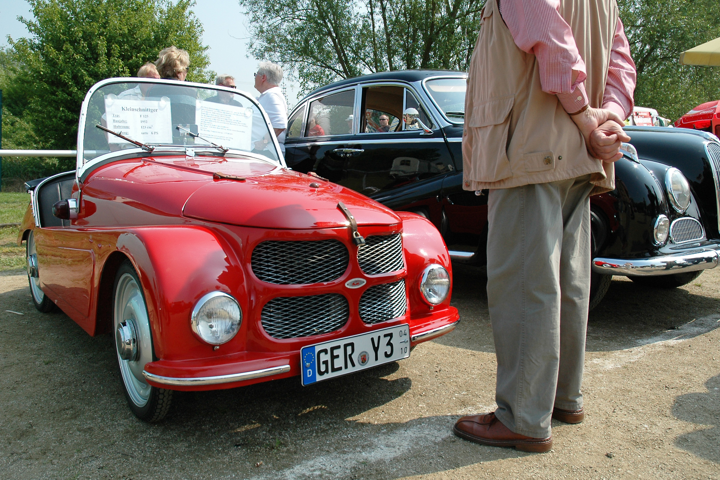 Kleinschnittger F125, Baujahr 1952